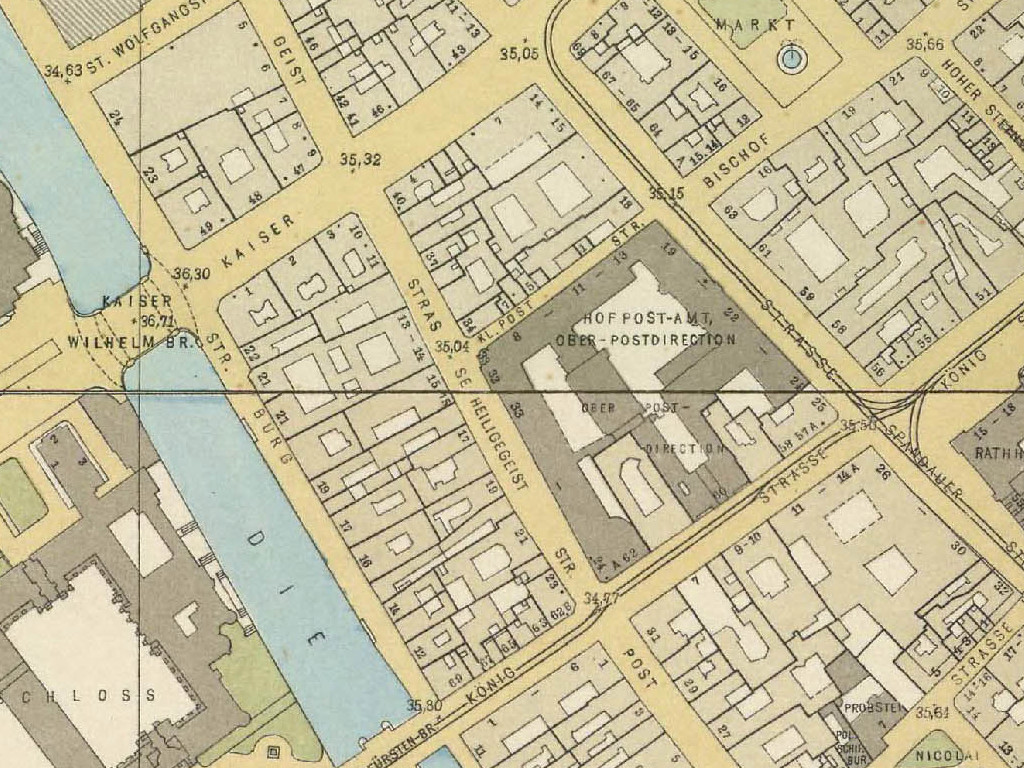 Straubeplan Heiliggeistviertel